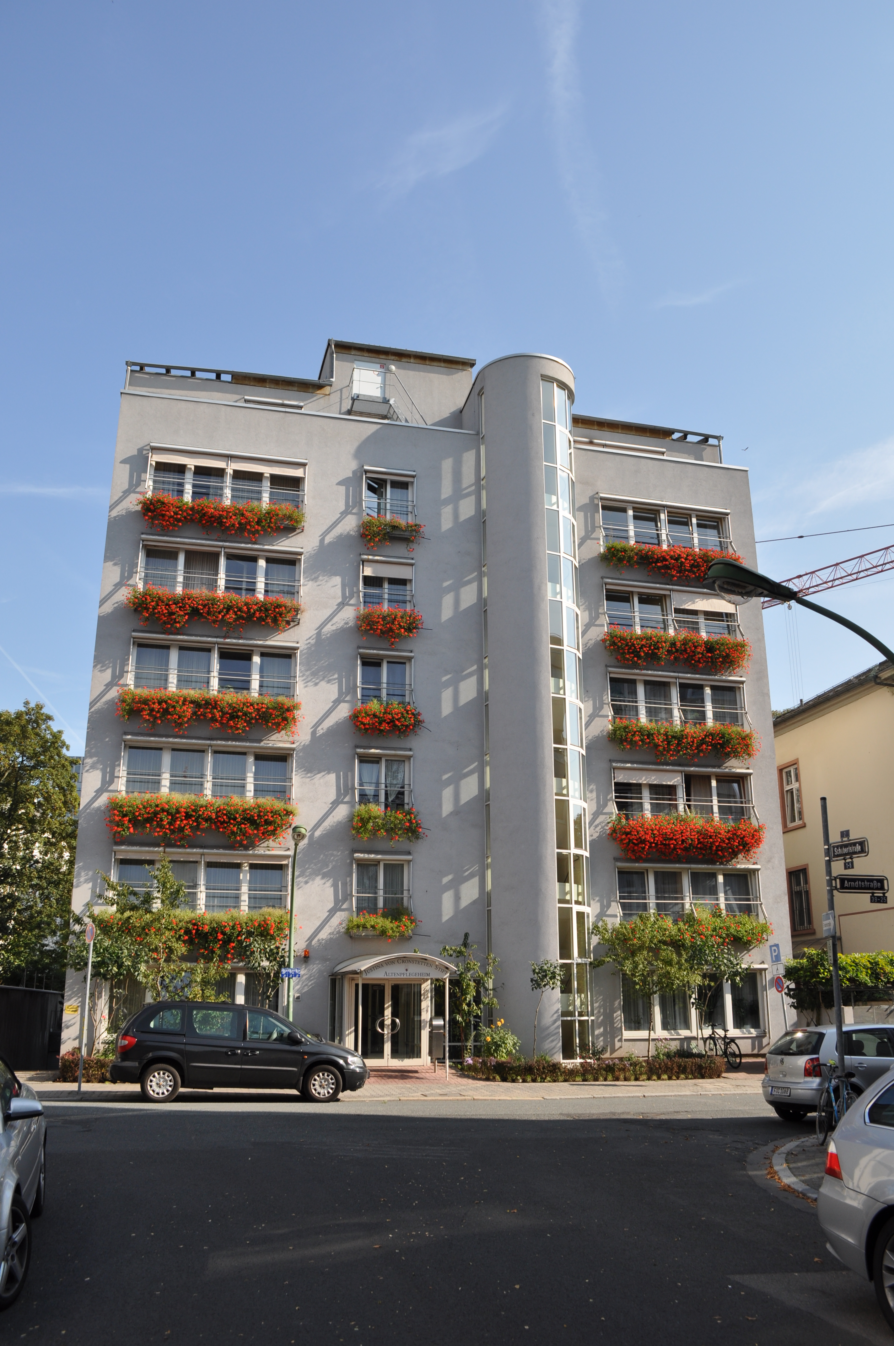 Justina von Cronstetten Stift Altenpflegeheim in der Arndtstraße in Frankfurt